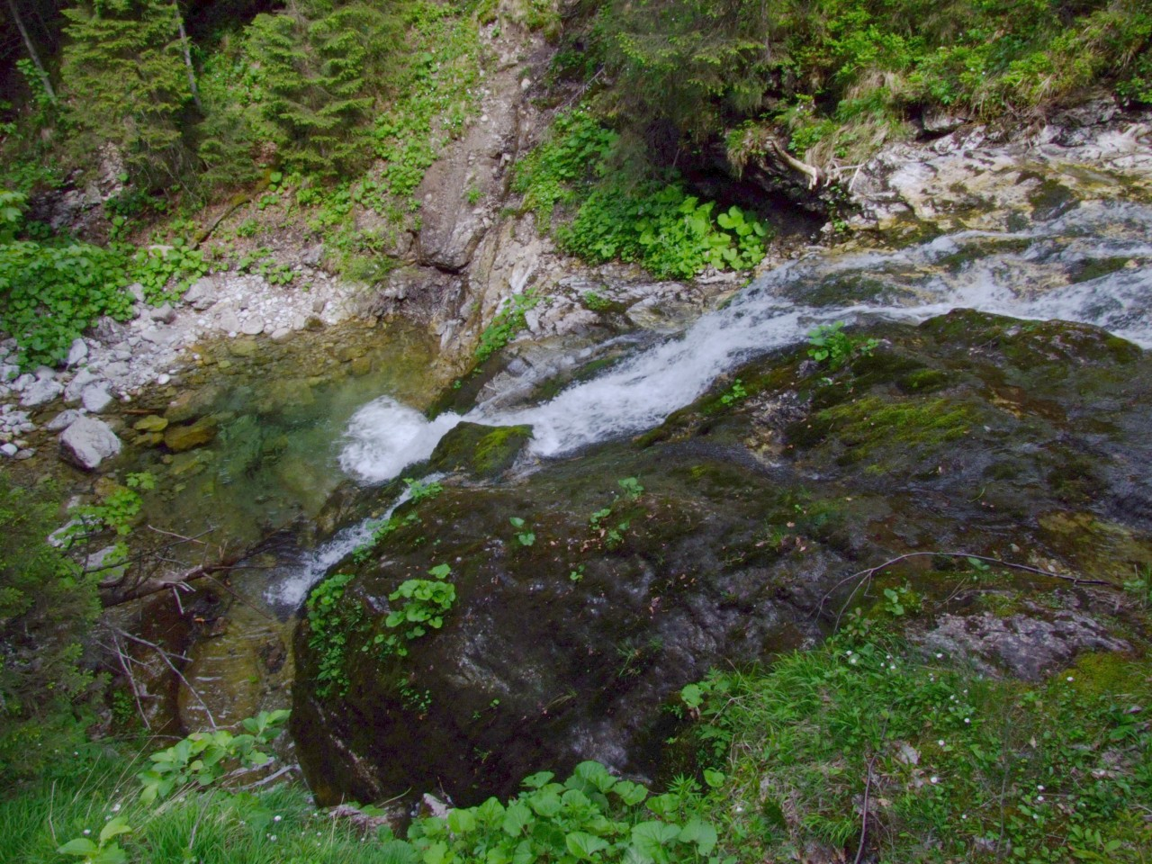 Strążyski Potok